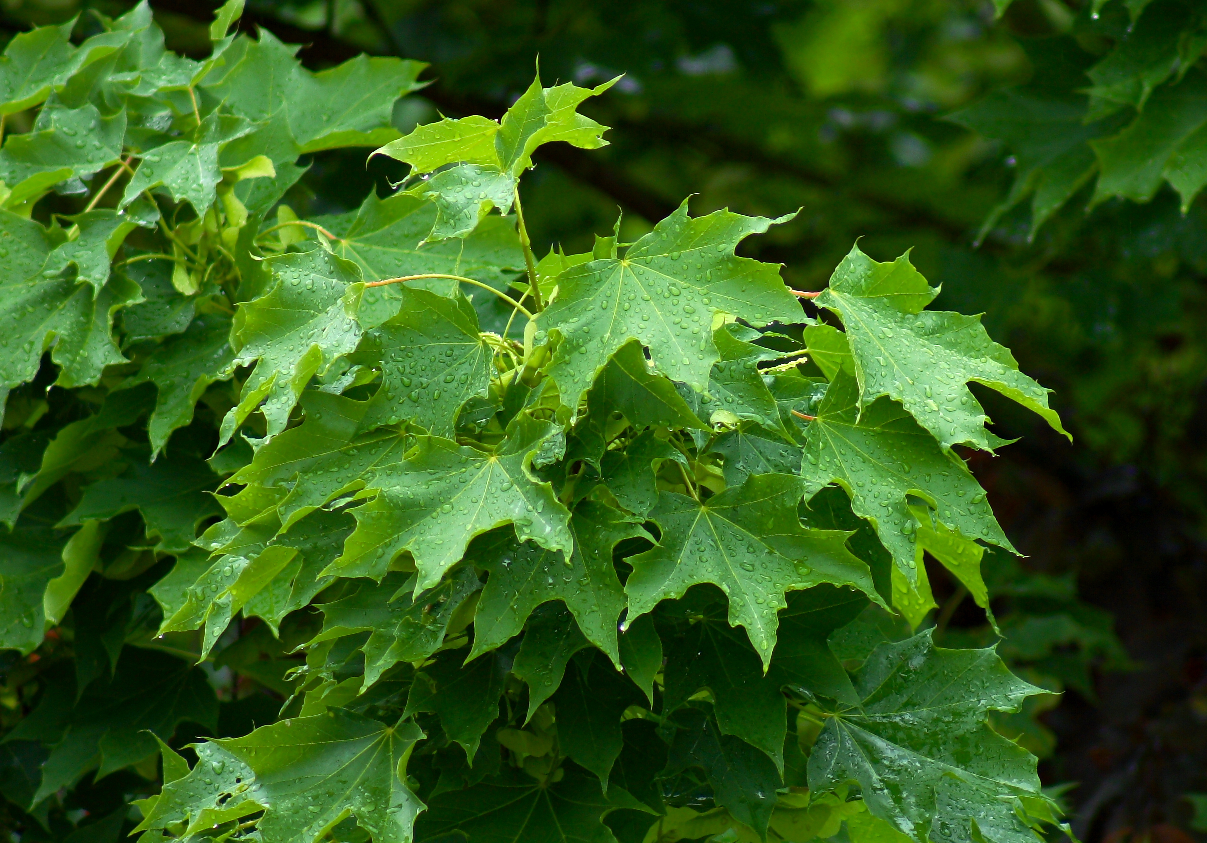 Spitz-Ahorn (Acer platanoides)